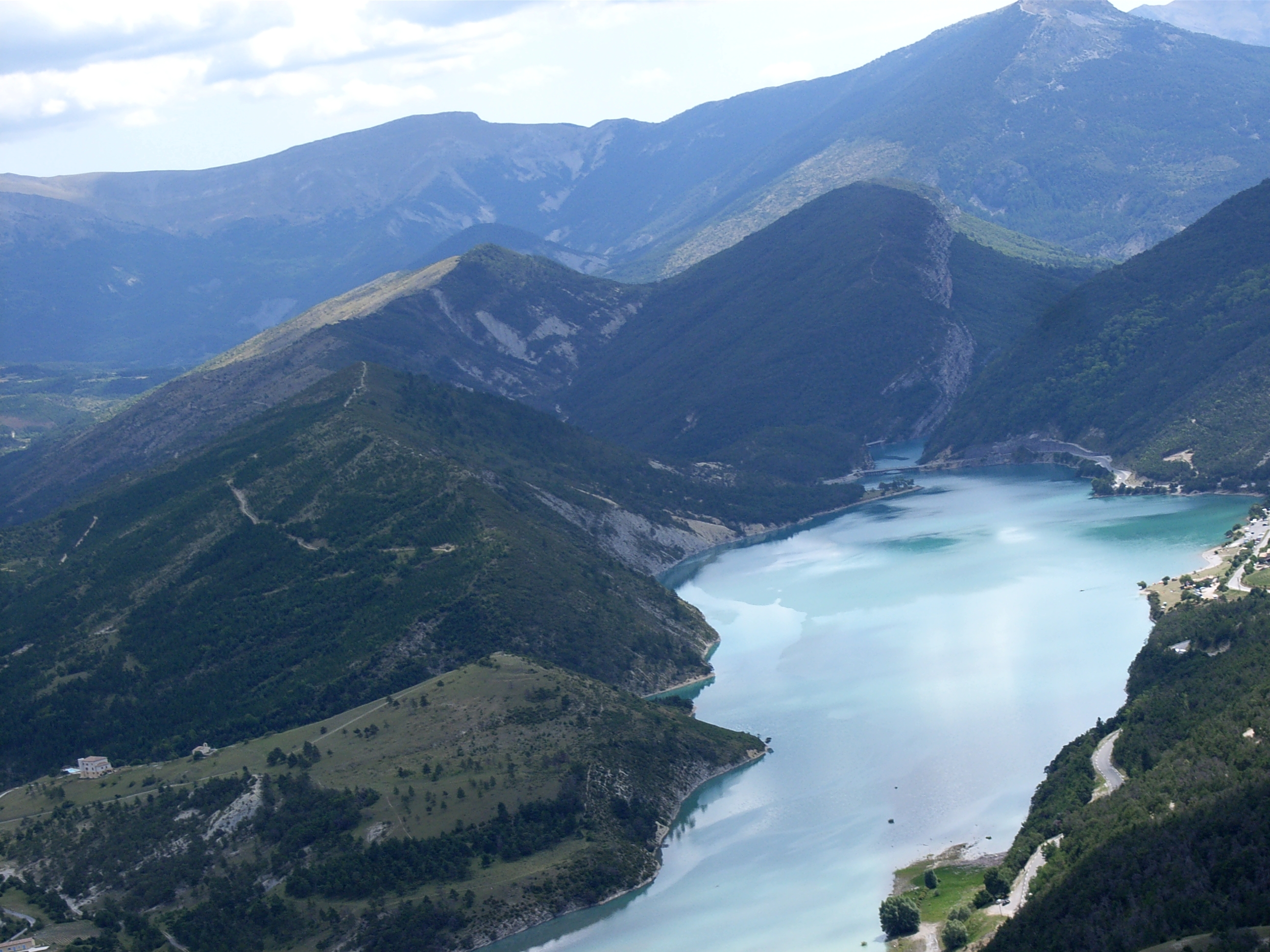 Le lac de Castillon vu de parapente à Saint-André-les-Alpes